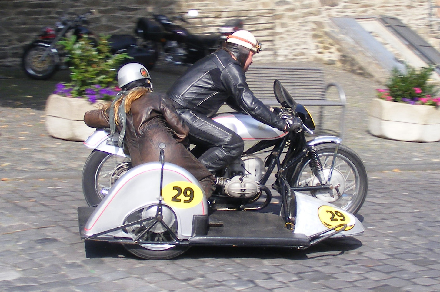 BMW mit Seitenwagen Oldtimer Motorrad Monschau 2008